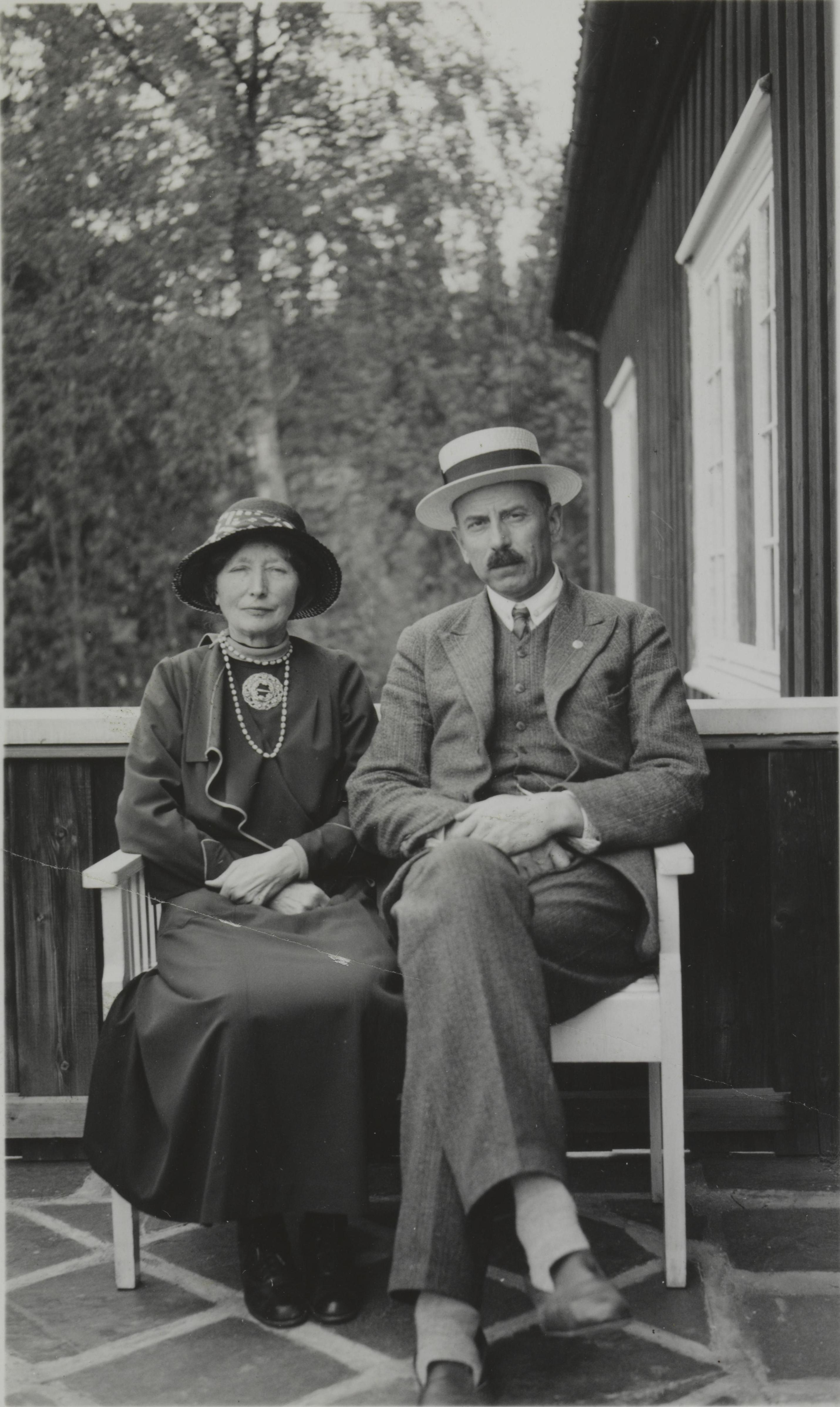 Bildet er hentet fra Nasjonalbibliotekets bildesamling Skådalen, Oslo, Oslo Depicted person: Holmsen, Gunnar Depicted person: Holmsen, Per